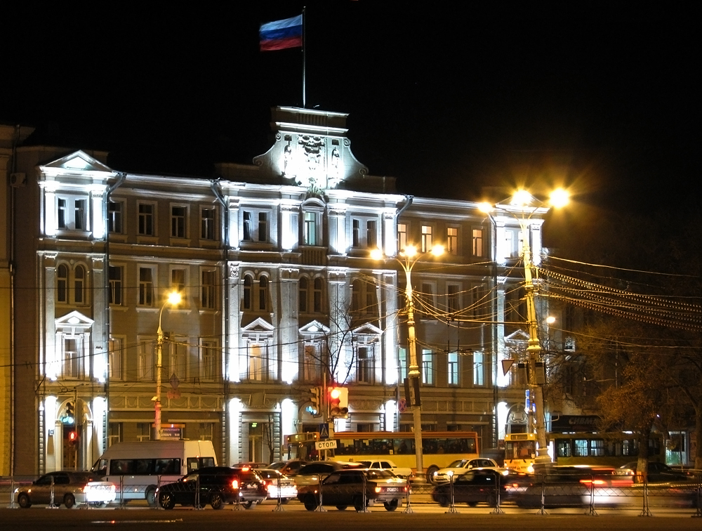 Мэрия города Воронеж.